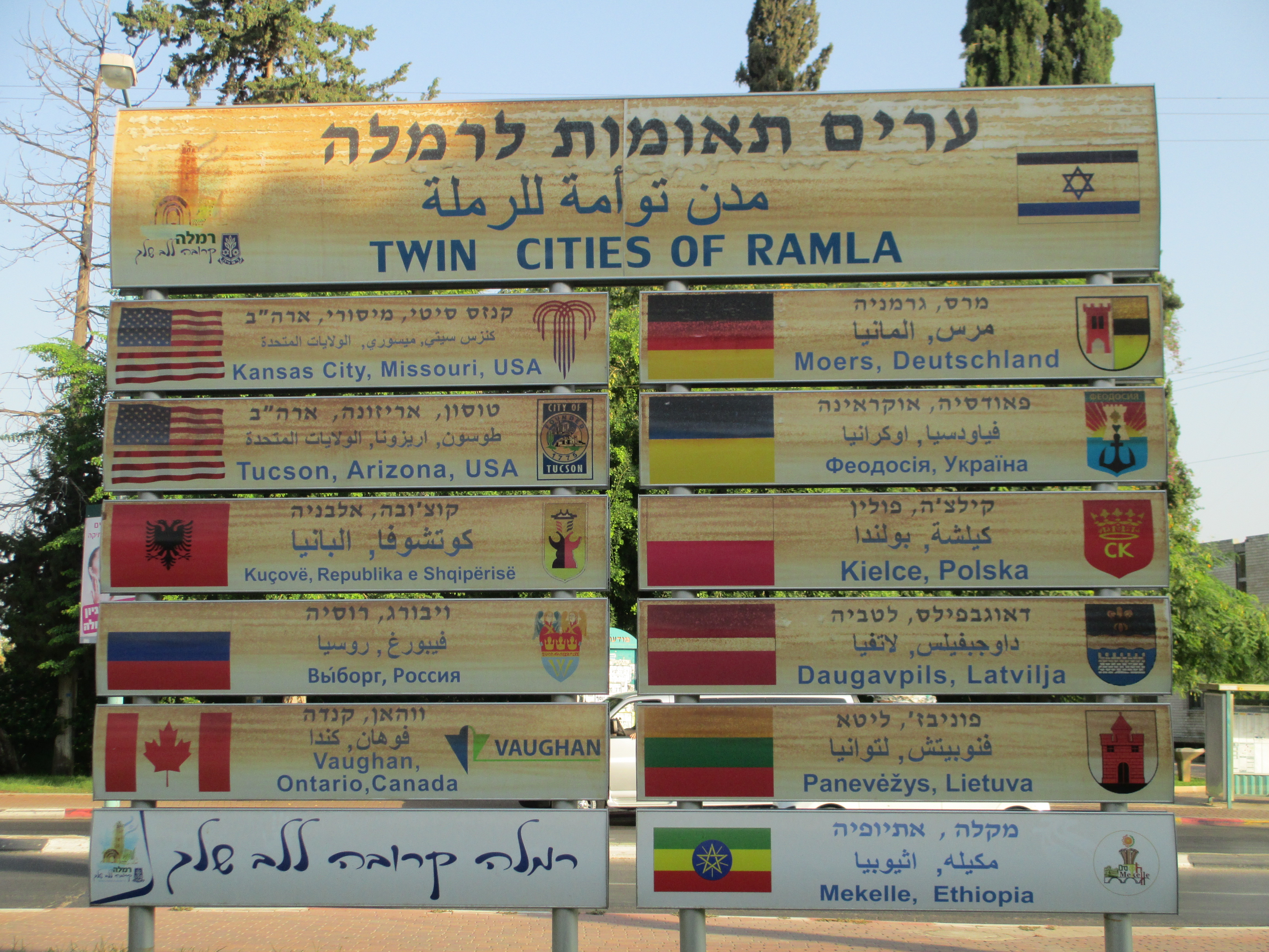 ערים תאומות לרמלה